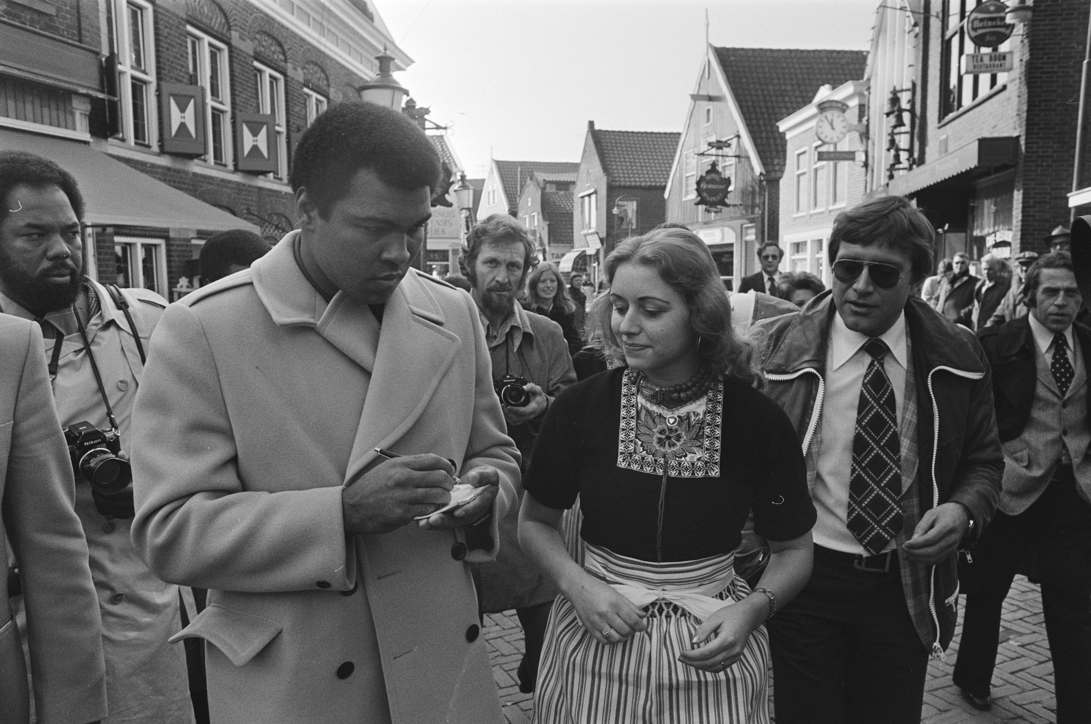 Muhammad Ali signing autographs for Volendam girls. Right: Ruud ter Weijden